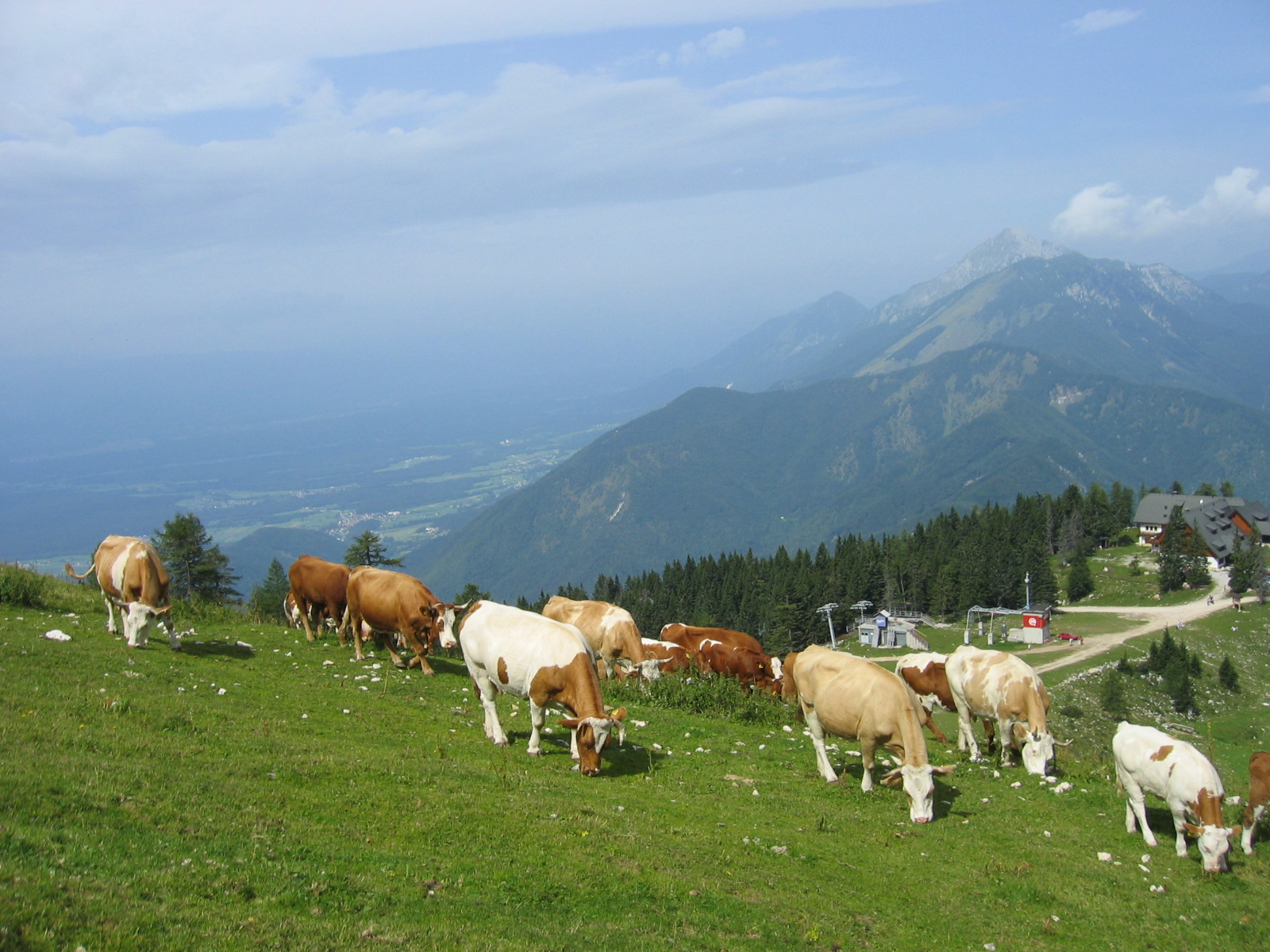 Smučišča so v poletnem času pašniki.